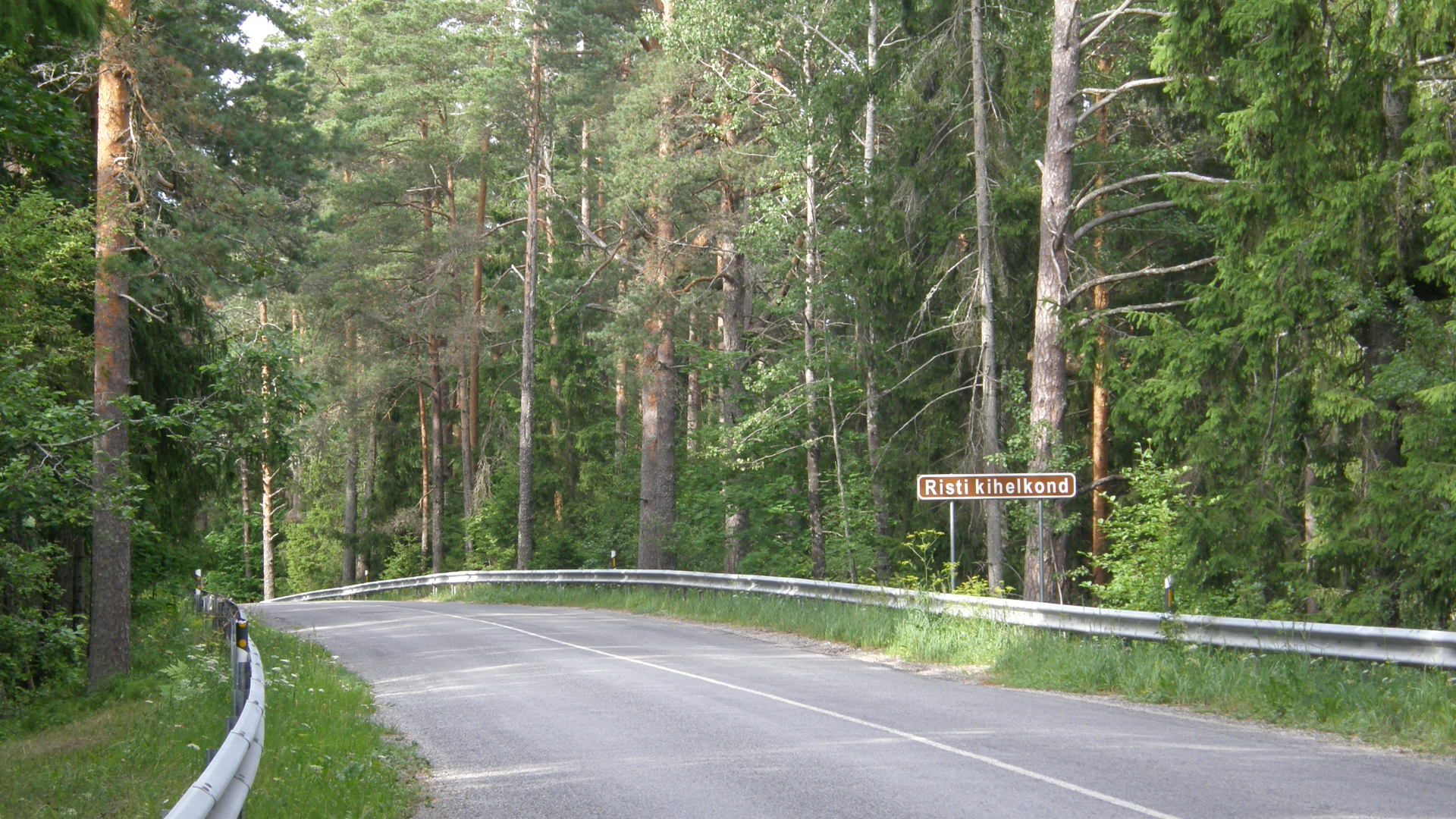 Risti kihelkonna silt Keila-Haapsalu maanteel